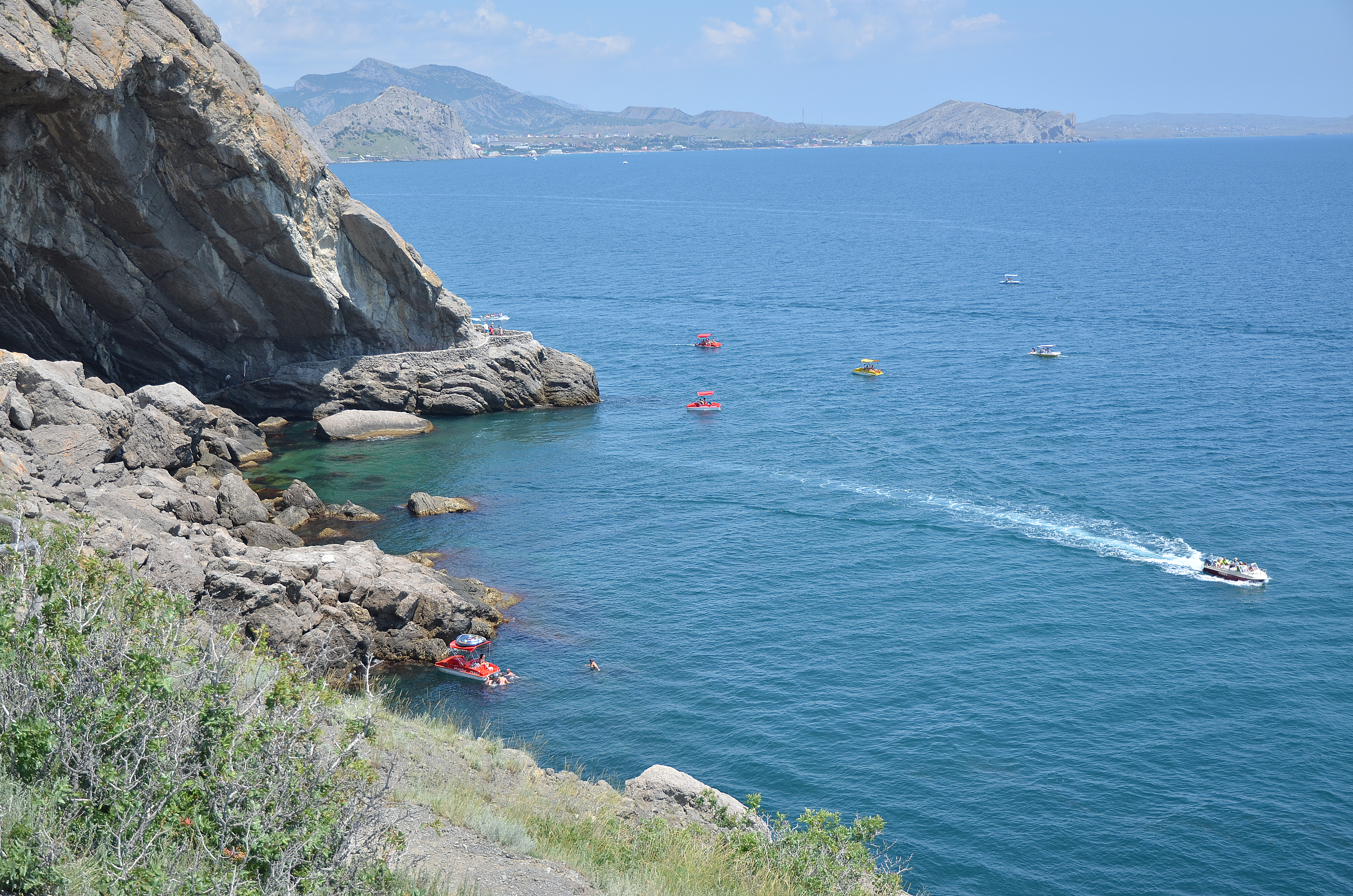 Подробнее здесь